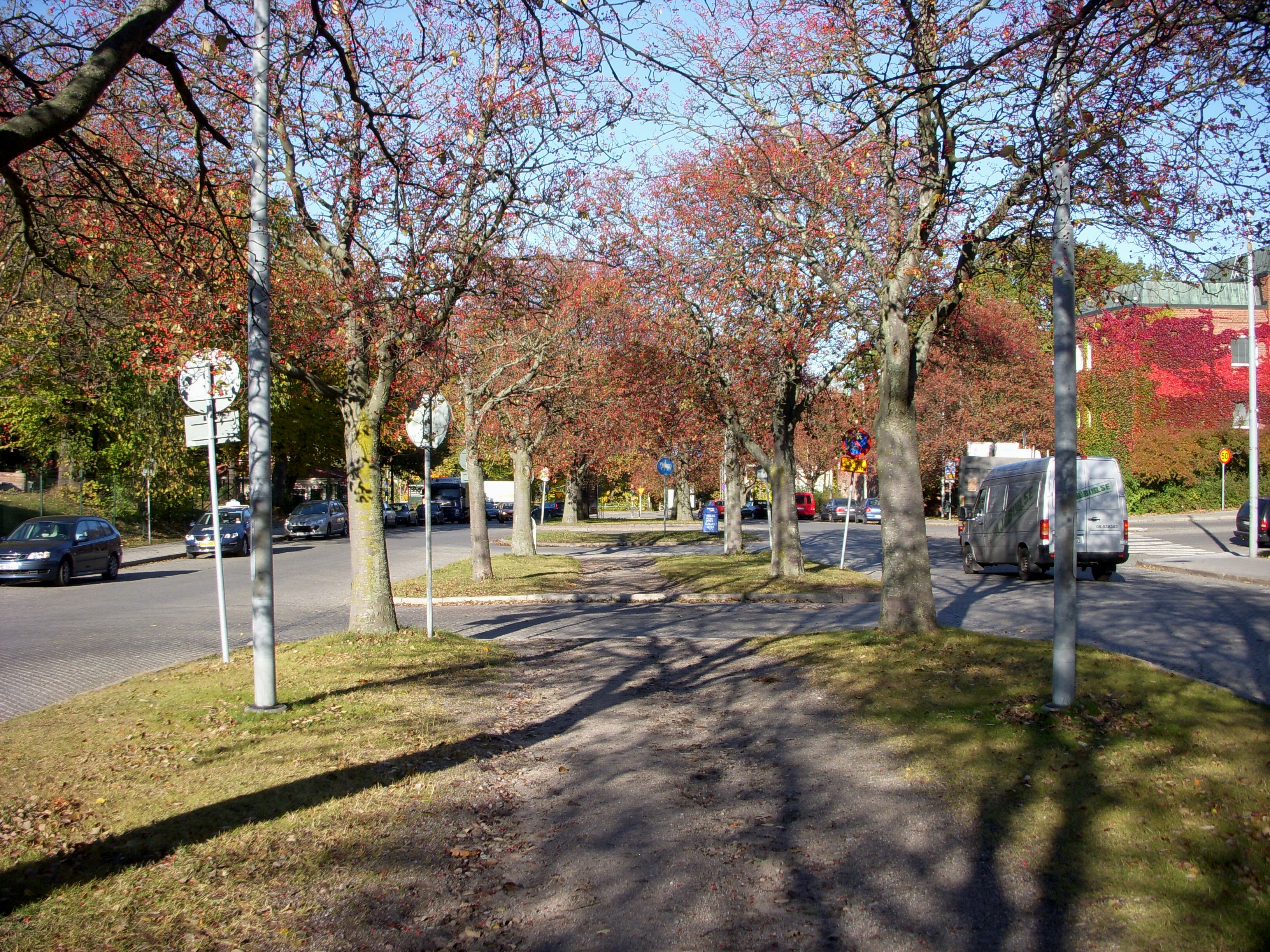 Erik Dalbergsgatan på Gärdet i Stockholm